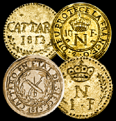 Napoleonov novac kovan u Kotoru 1813. godine